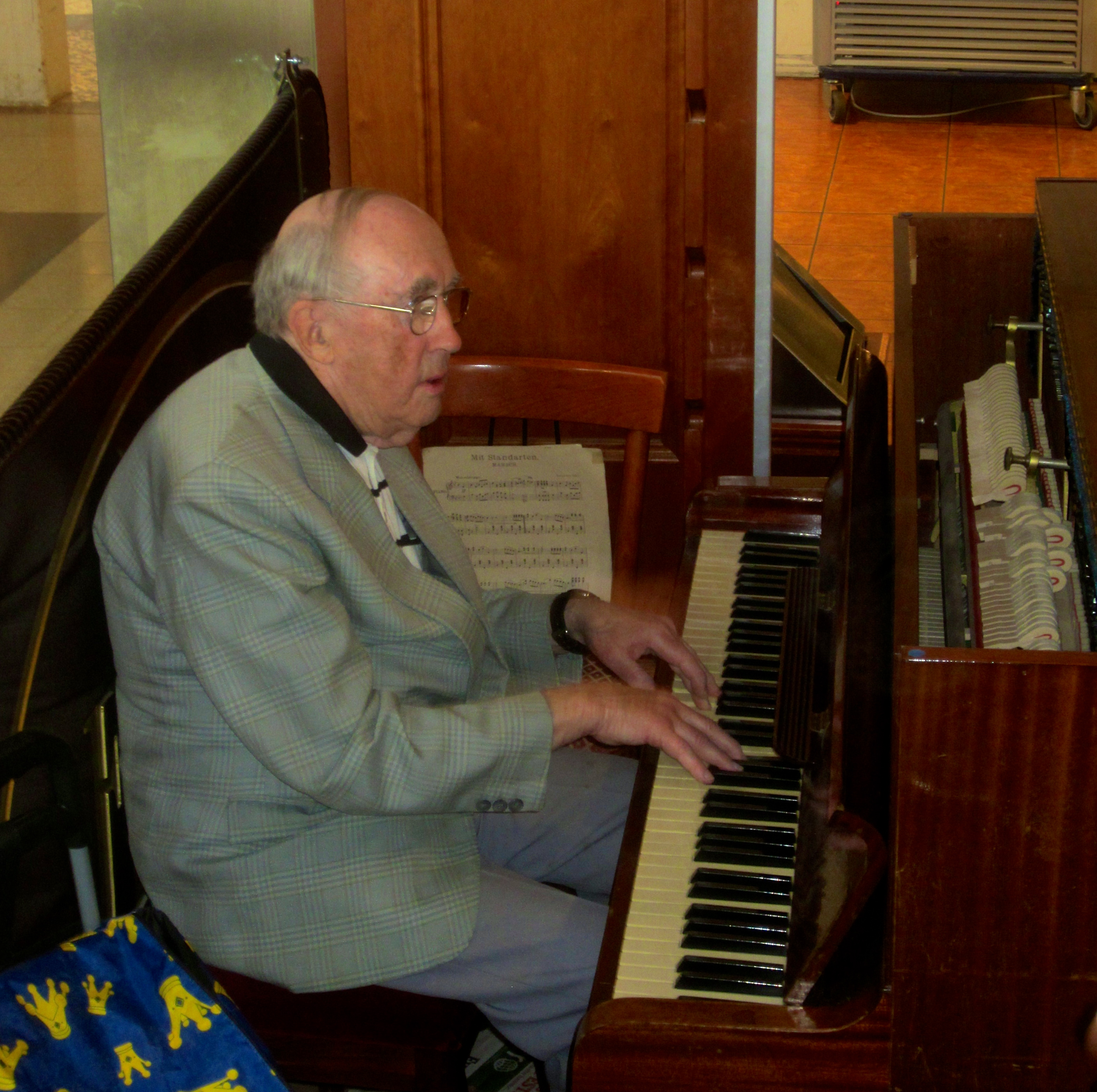 Harry Persson, pianist.